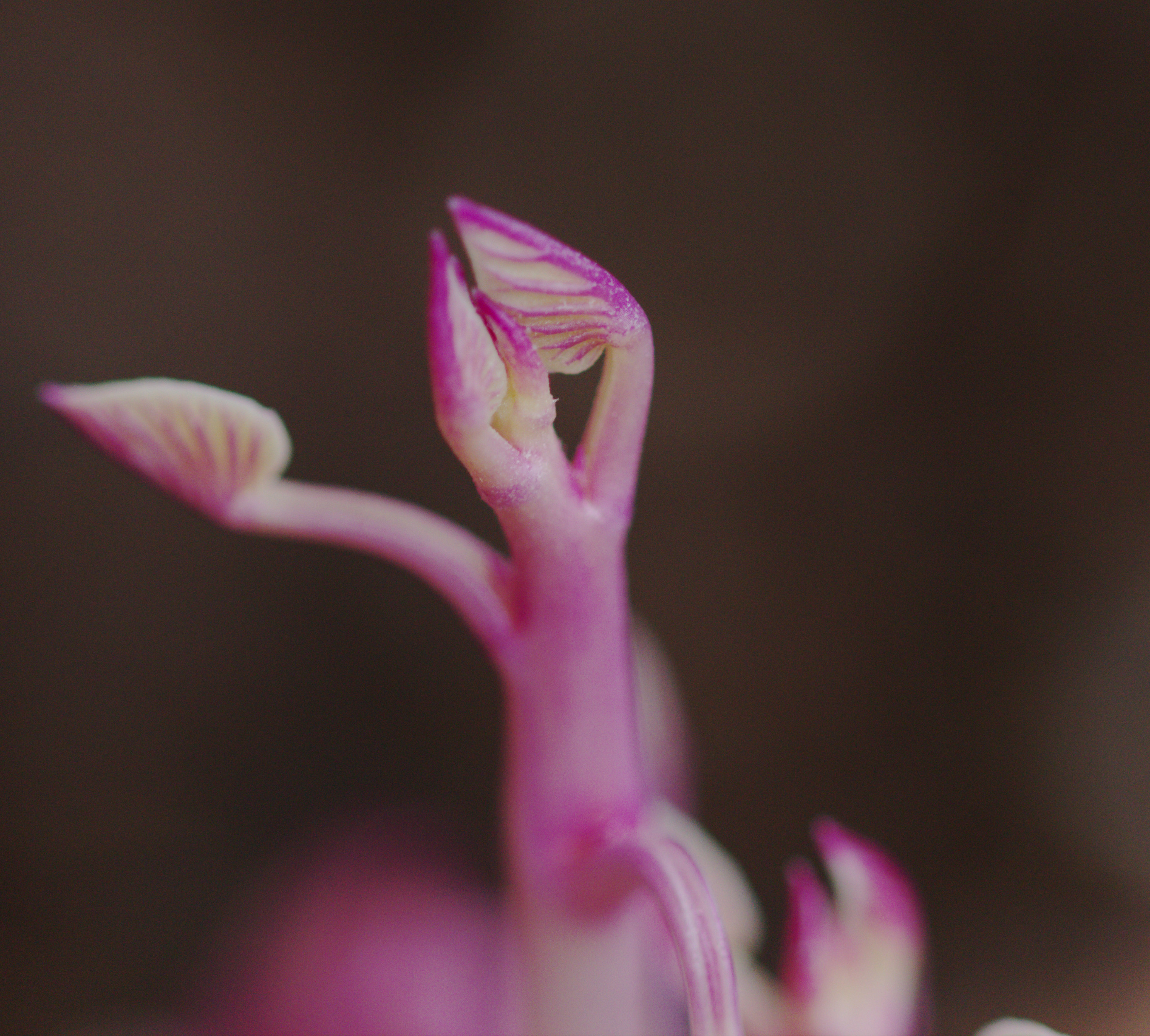 Knospen einer Süßkartoffel